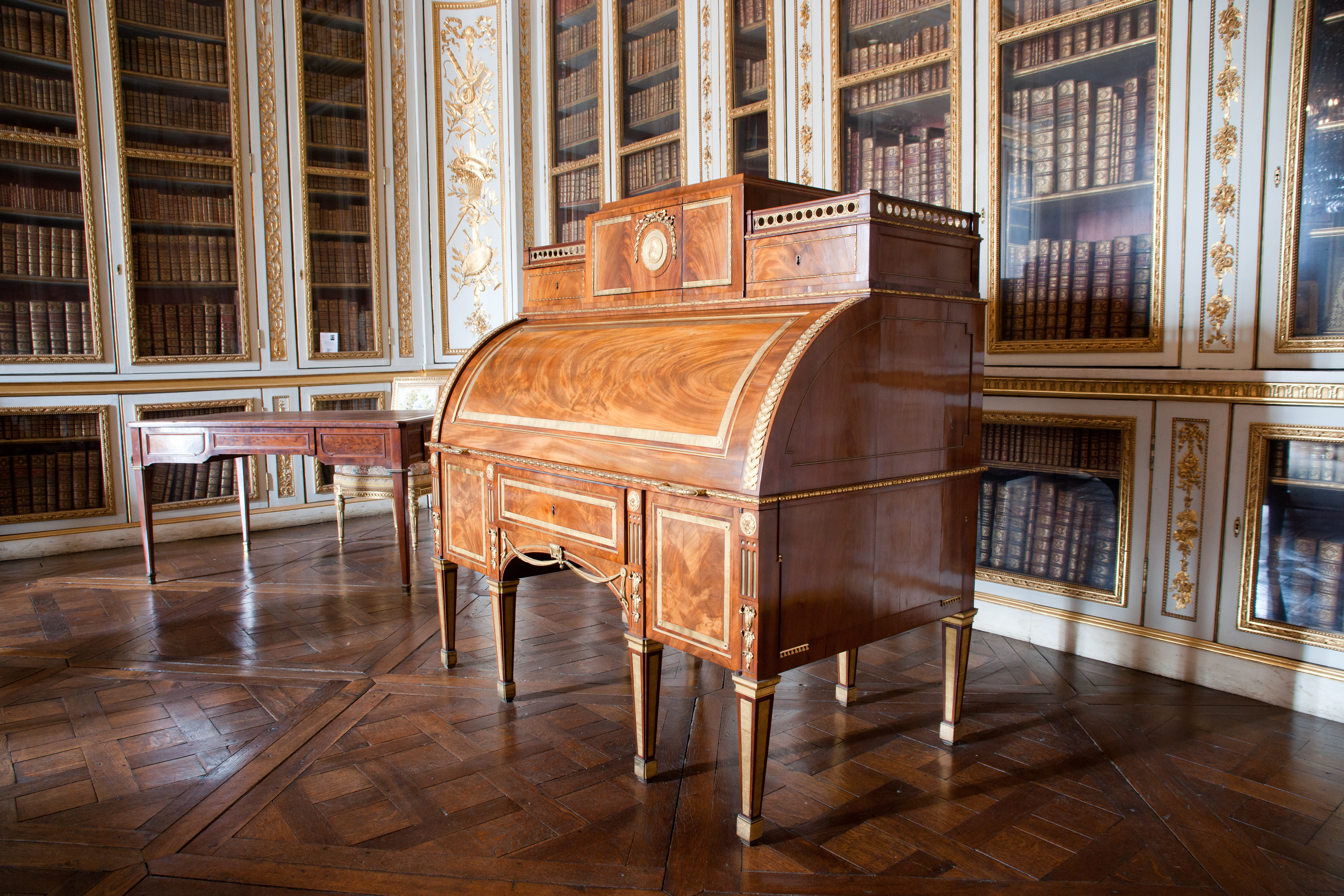 Secretaire à cylindre dit des Etats de Bourgogne, avant 1785, acajou ronceux, bronzes ciselés et dorés, médaille signée Duvivier portant l'inscription: A Louis XVI, très excellent Roi de France et de Navarre, les Etats de Bourgogne, Bibliothèque de Louis XVI, Petit appartement du roi, Château de Versailles. - Meuble offert en 1785 à Louis XVI par les Etats de Bourgogne.